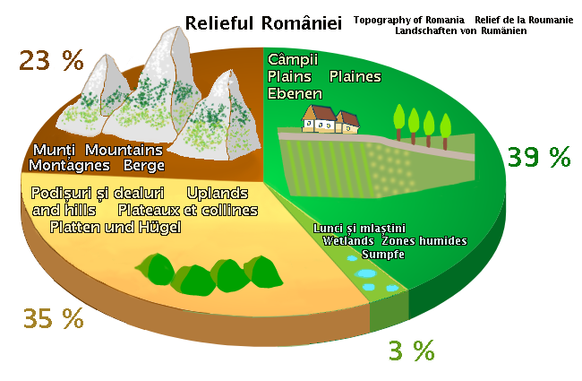 Relief de la Roumanie (proportions approximatives)